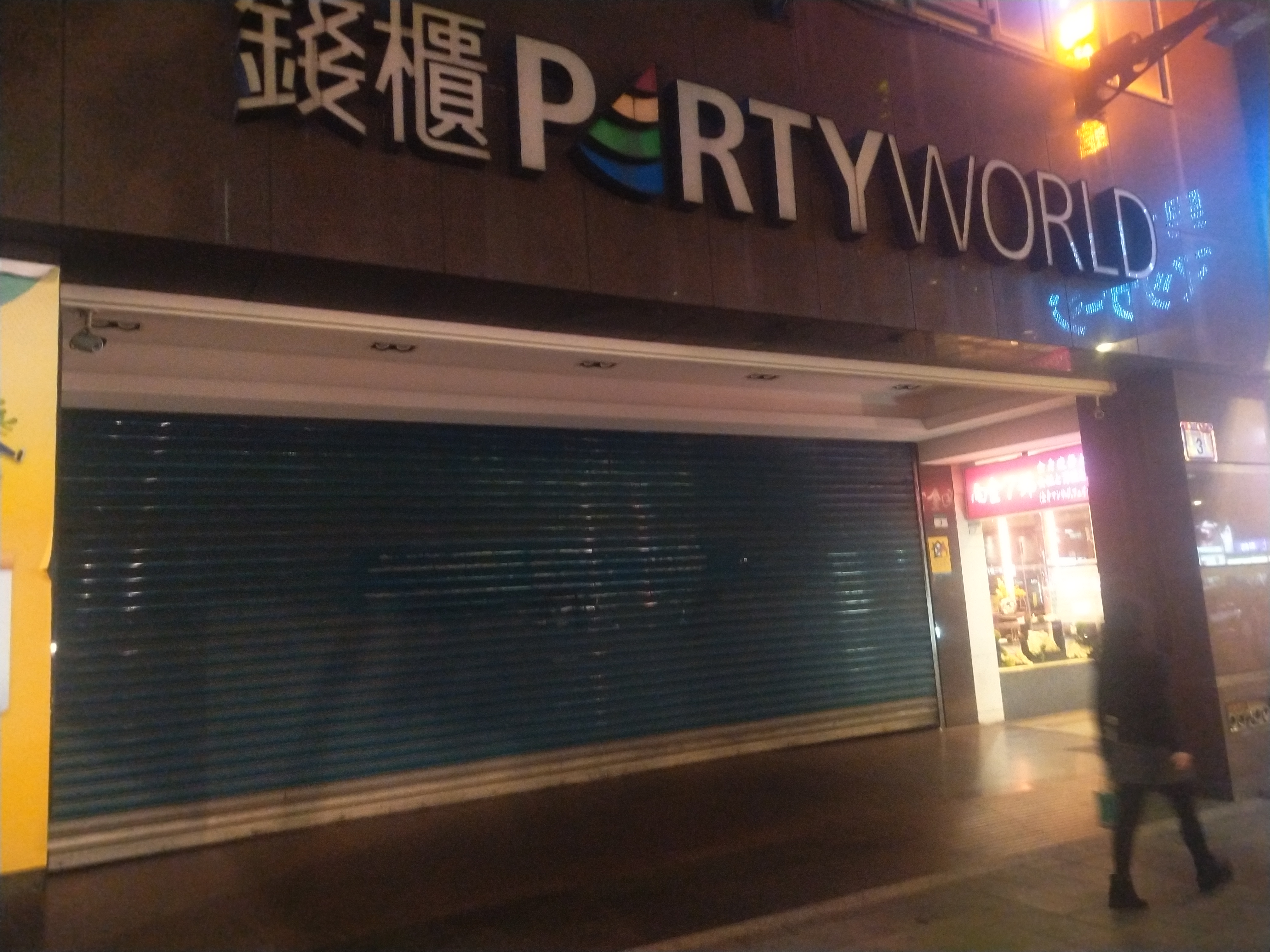 中文（台灣）: 錢櫃南京店